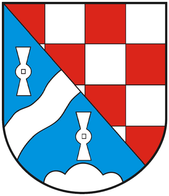 Wappen von Reichenbach (bei Baumholder)